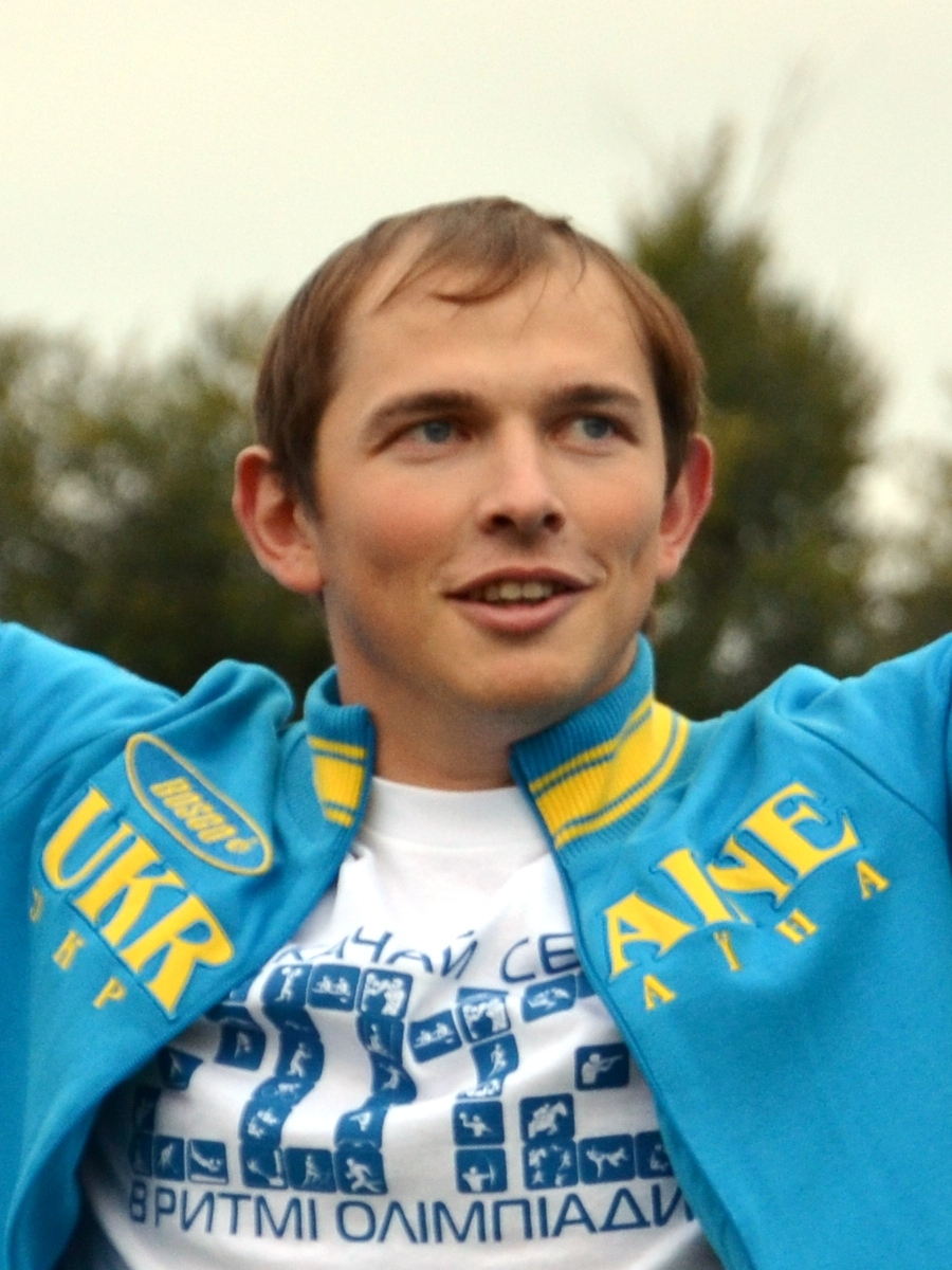 Юрій Чебан на Олімпійському уроці "прокачай себе в ритмі Олімпіади". м. Умань, 19 жовтня 2012 року